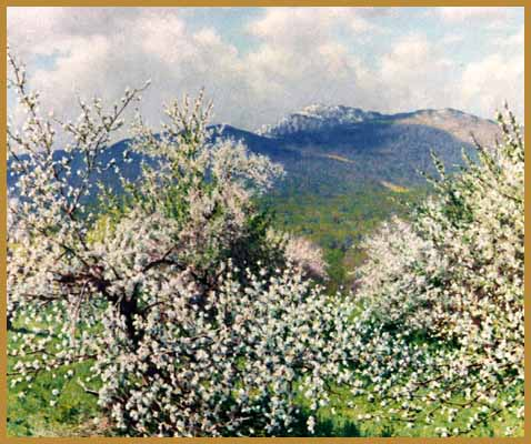 Monadorch